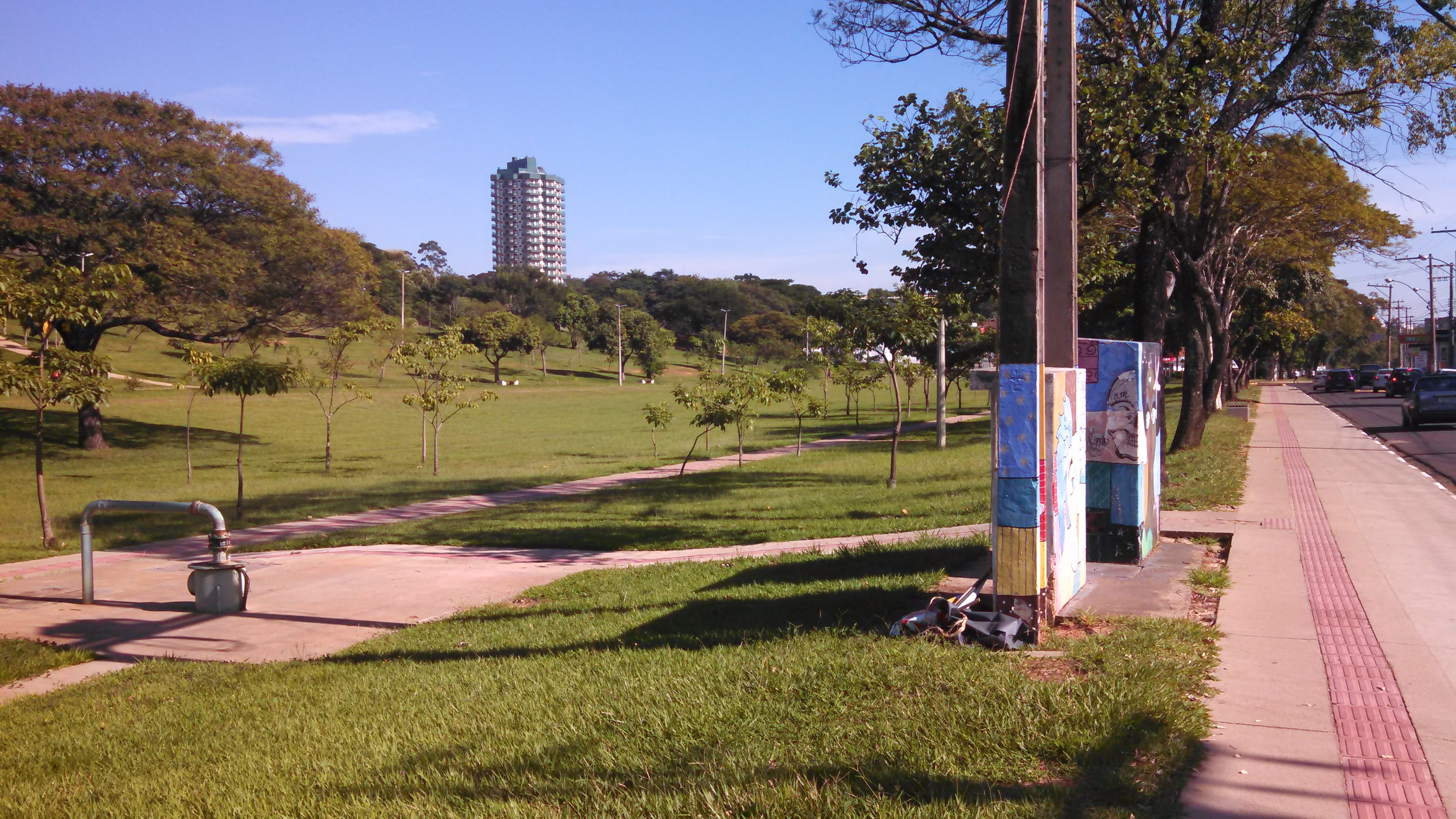 Vista do Parque do Provo a partir da calçada da Avenida 14 de Setembro.